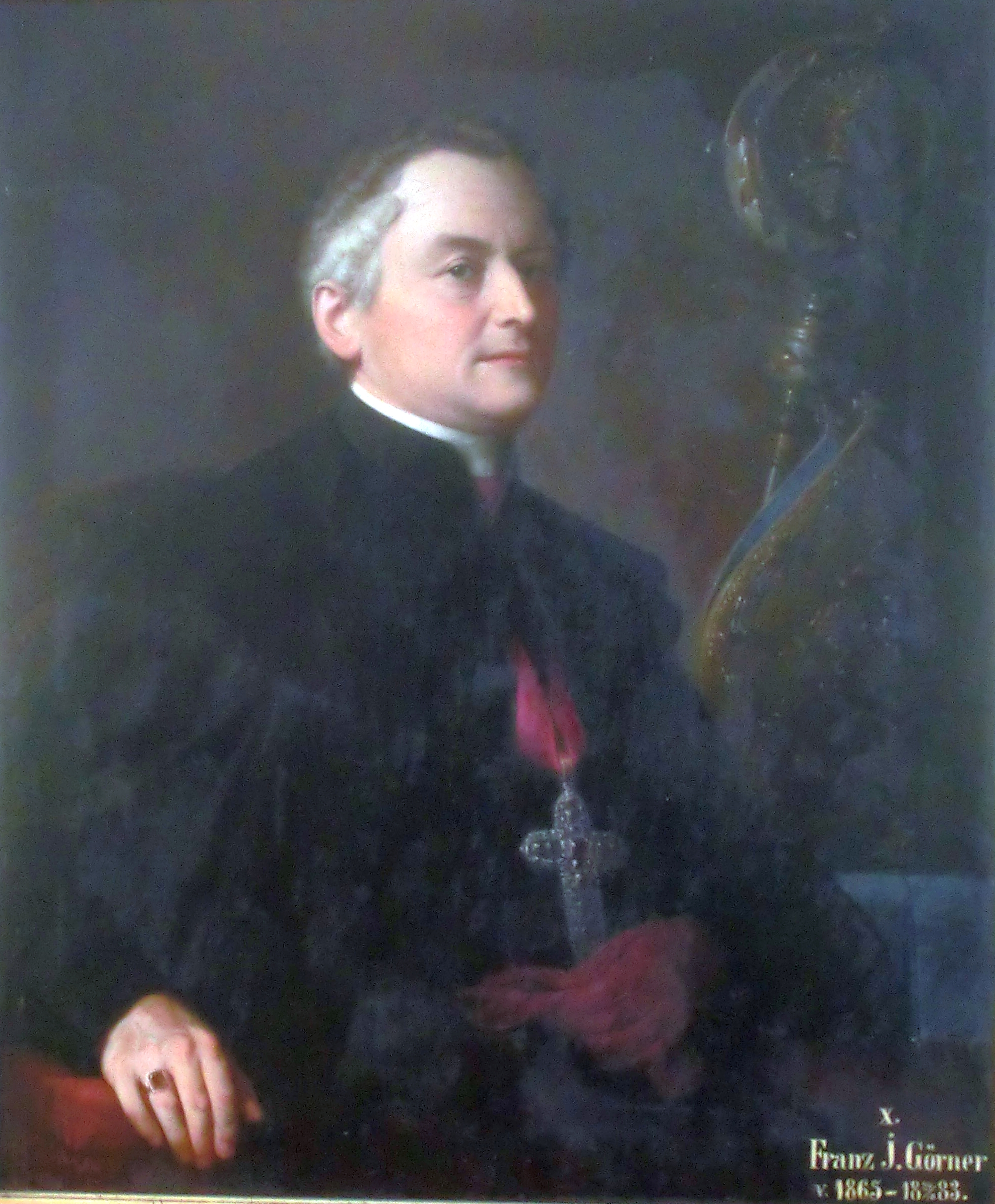 Hornopolický arciděkan Franz Josef Görner.